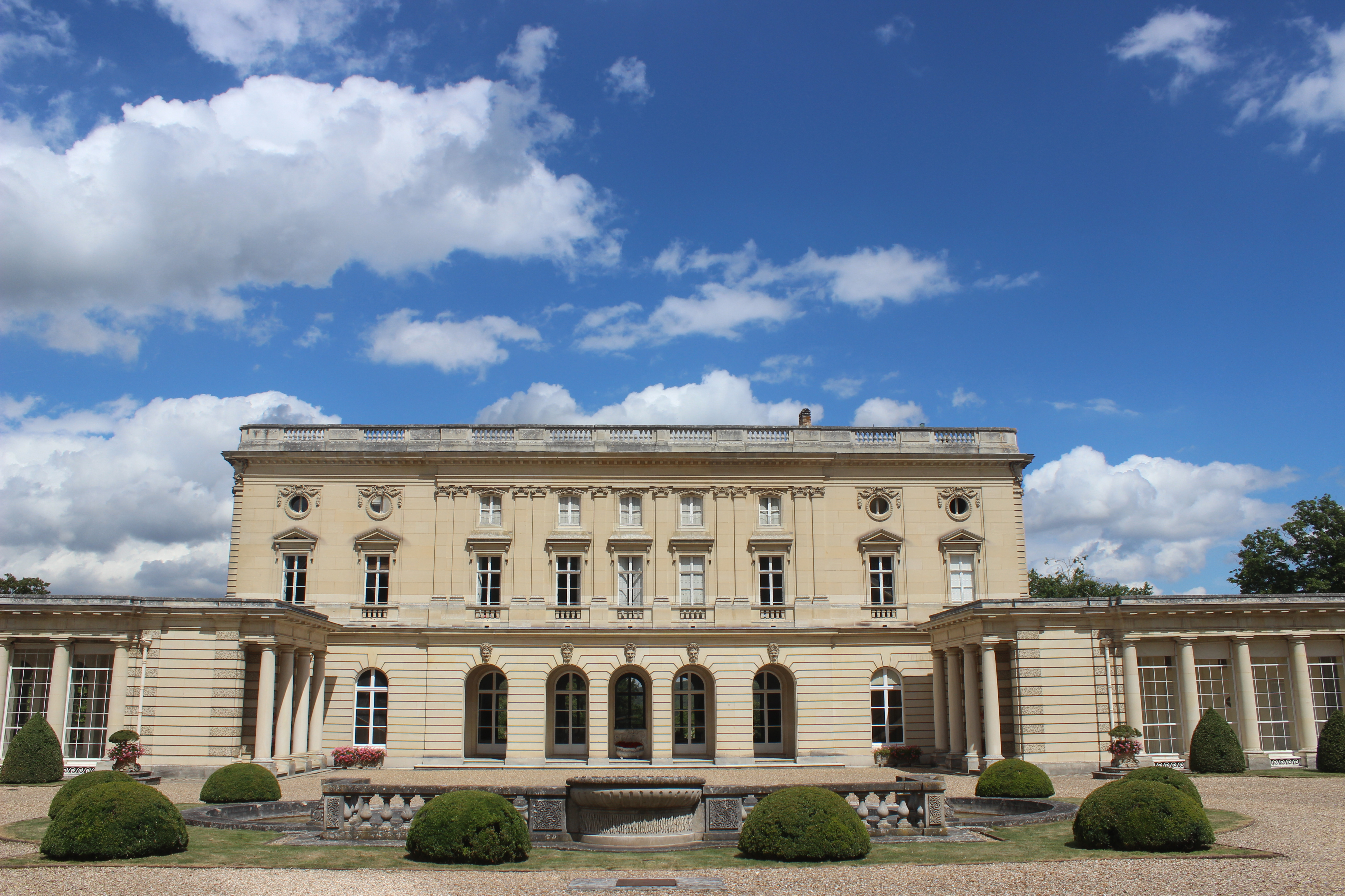 Vernon. Château de Bizy. Fachada principal.